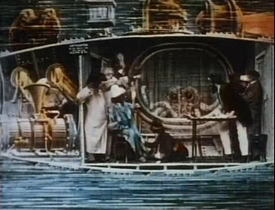 Méliès, Le voyage a travers l'impossible1904 colorizée 29